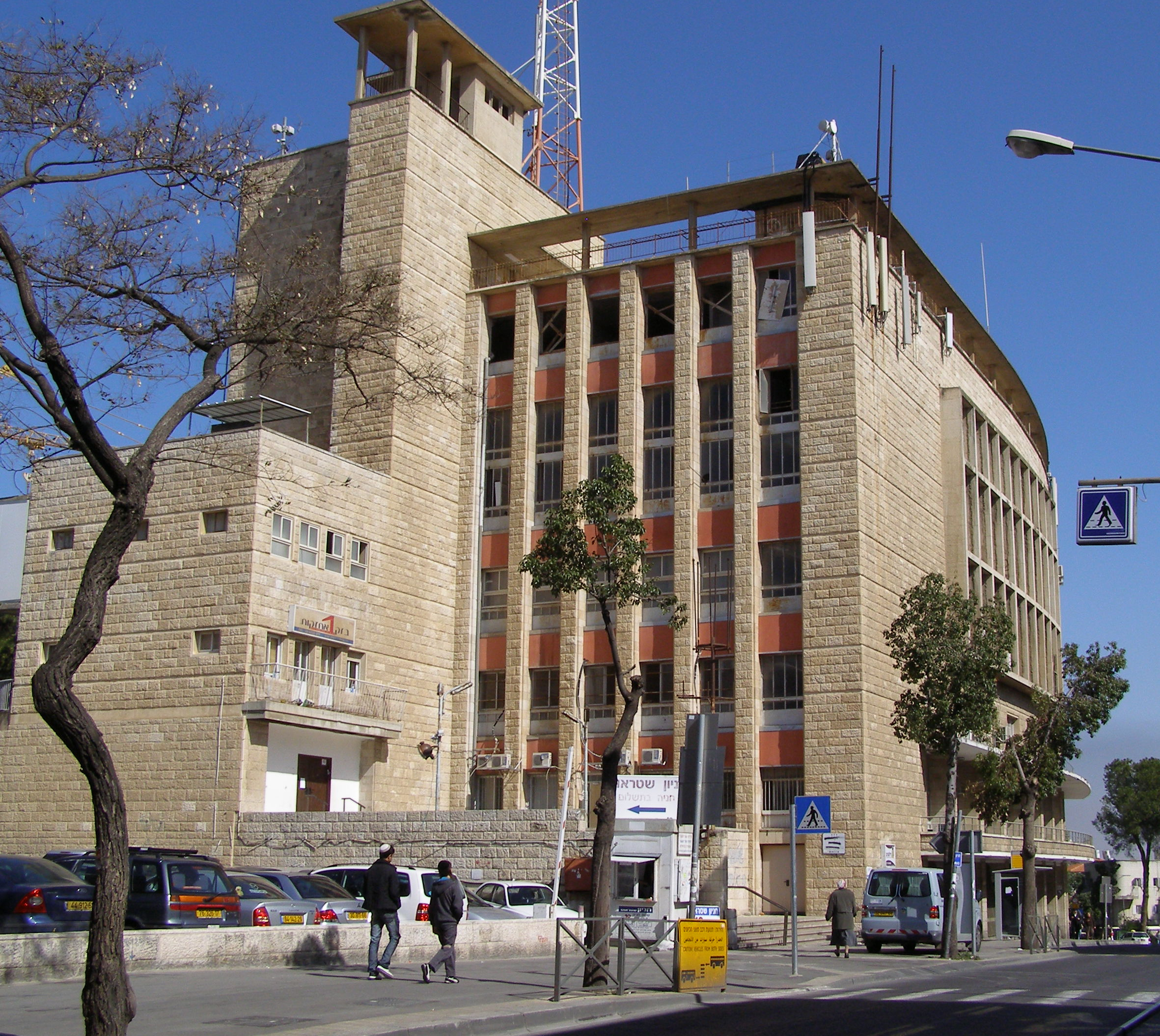 Histadrut building on Straus Street, Jerusalem